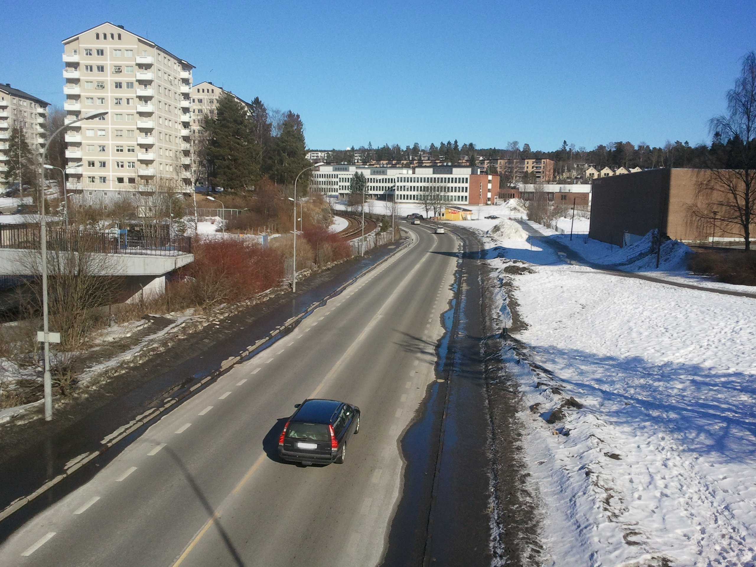 General Ruges vei på Bøler, Ulsrud videregående skole i bakgrunnen